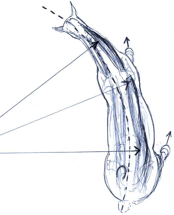 muskulaturwirkung